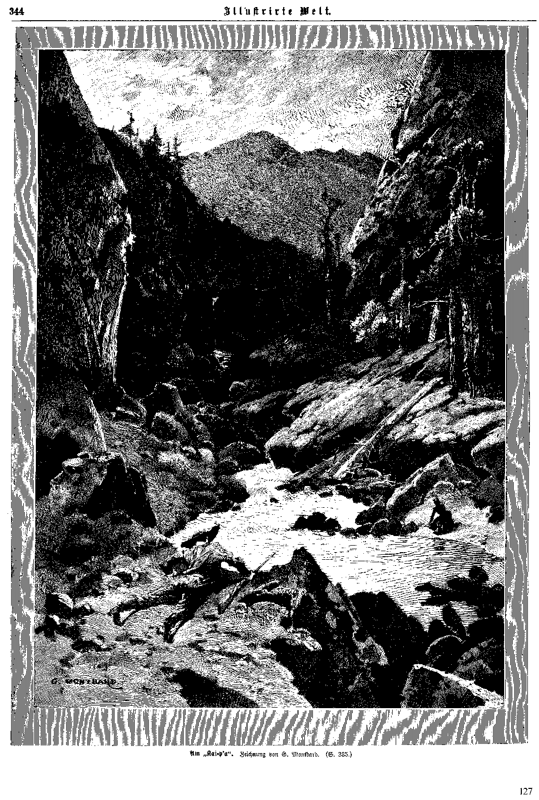 In: Illustrierte Welt. Deutsches Familienbuch. Blätter aus Natur und Leben, Wissenschaft und Kunst. 38. Jahrgang, Heft 14, S. 335, 337, 338 und 344 Reprintvorhaben der Karl-May-Gesellschaft von Erstveröffentlichungen v.a. früher Karl-May-Erzählungen